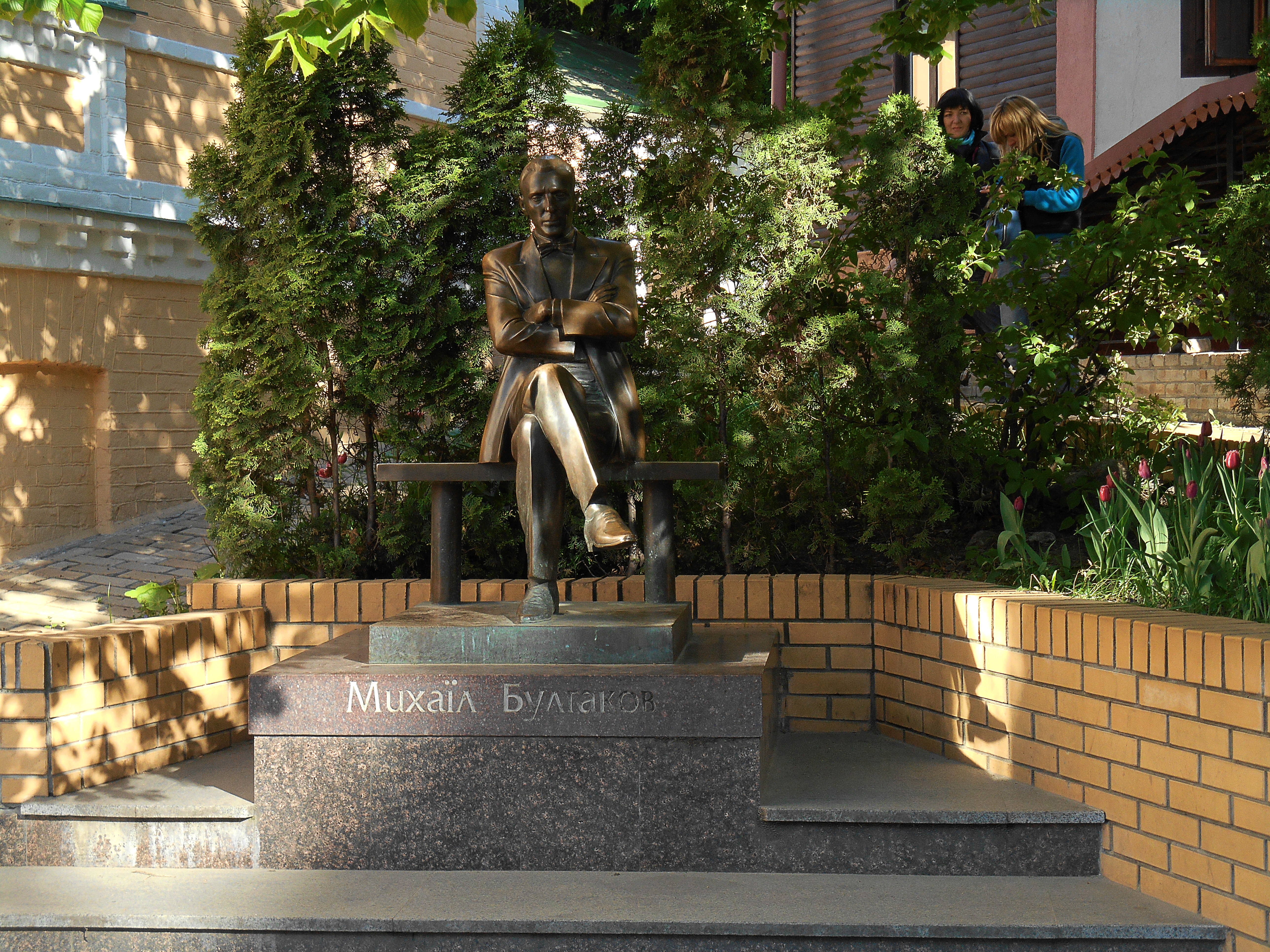 Замкова гора — Андріївський узвіз, Київ, Андріївський узвіз